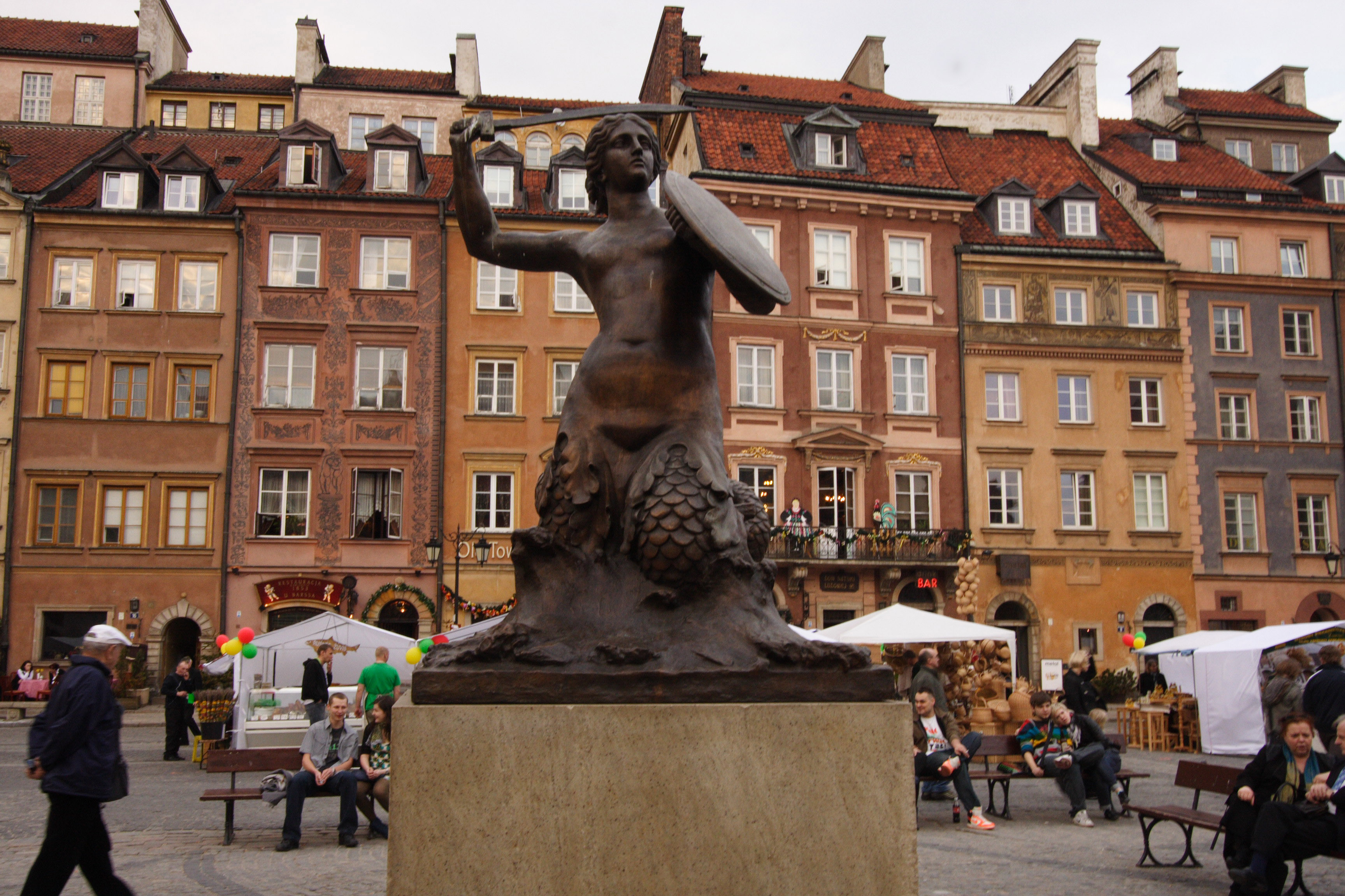 Символ Варшавы на рыночной площади Старого города